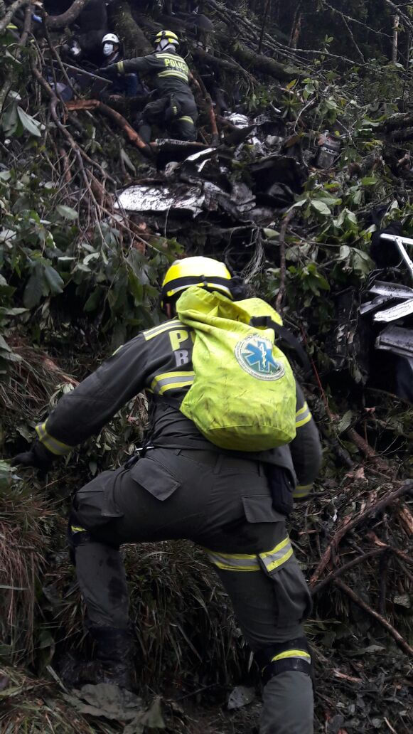 Labores de rescate de la Policía Nacional de Colombia al vuelo 2933 de LaMia, en área rural de La Unión (Antioquia).